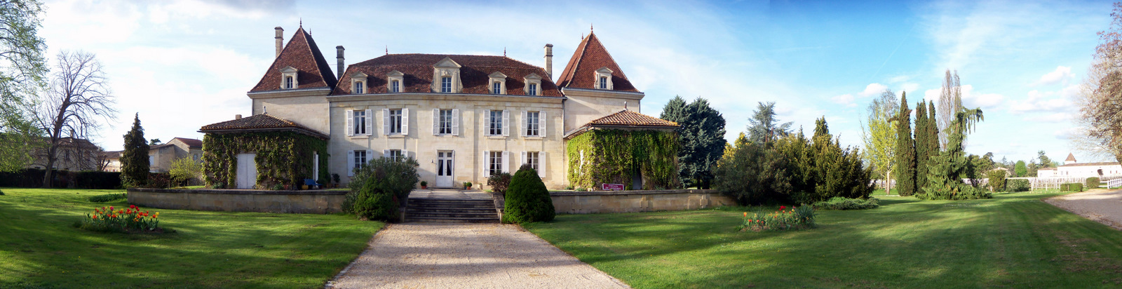 Vue panoramique du Château de Lavagnac